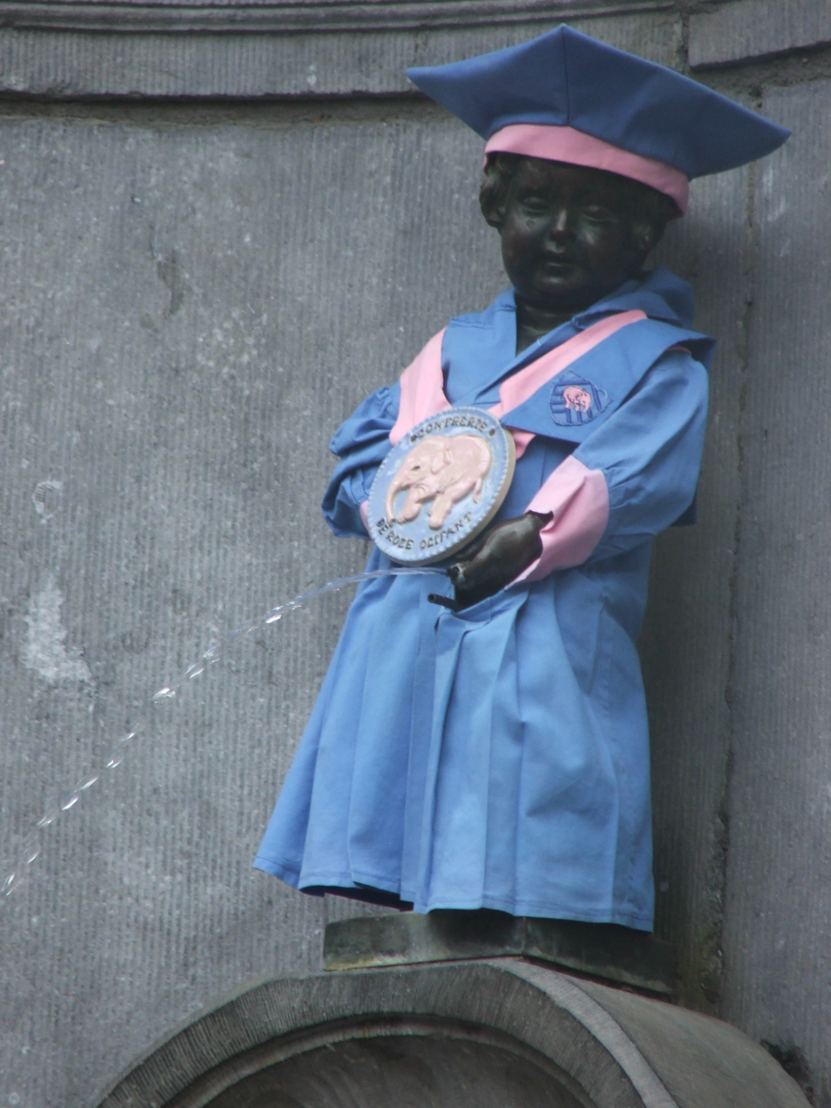 Le Manneken Pis en tenue de la Confrérie de L'éléphant Rose (Roze Olifant)lors du 11ème Chapitre de la Confrérie à Bruxelles.